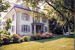 Komunuma muzeo de la urbo Dietikon. La dosiero estas kopiita el la oficiala retejo de la urbo Dietikon, kies enhavo estas libere reproduktebla laŭ la kondiĉoj similaj al aŭ pli ampleksaj ol de GFDL-permesilo de GNU 1.2.